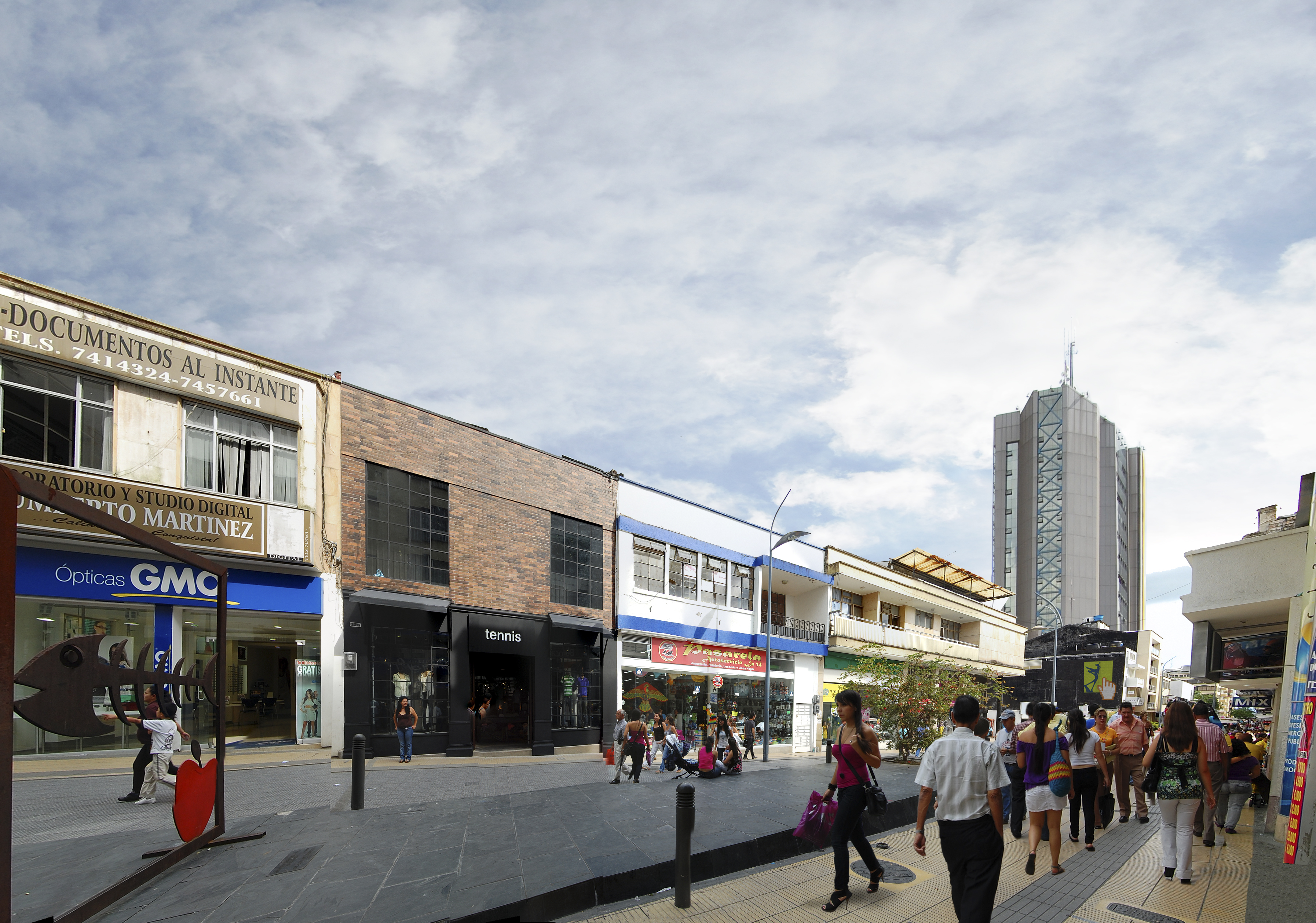 Centro Comercial Cielos Abiertos de Armenia Quindío